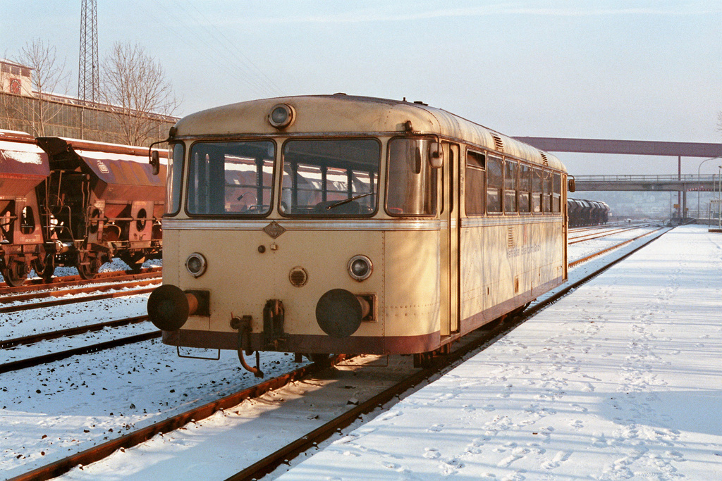 VT 50 der Hersfelder Eisenbahn im Dezember 1993 in Werk Hattorf